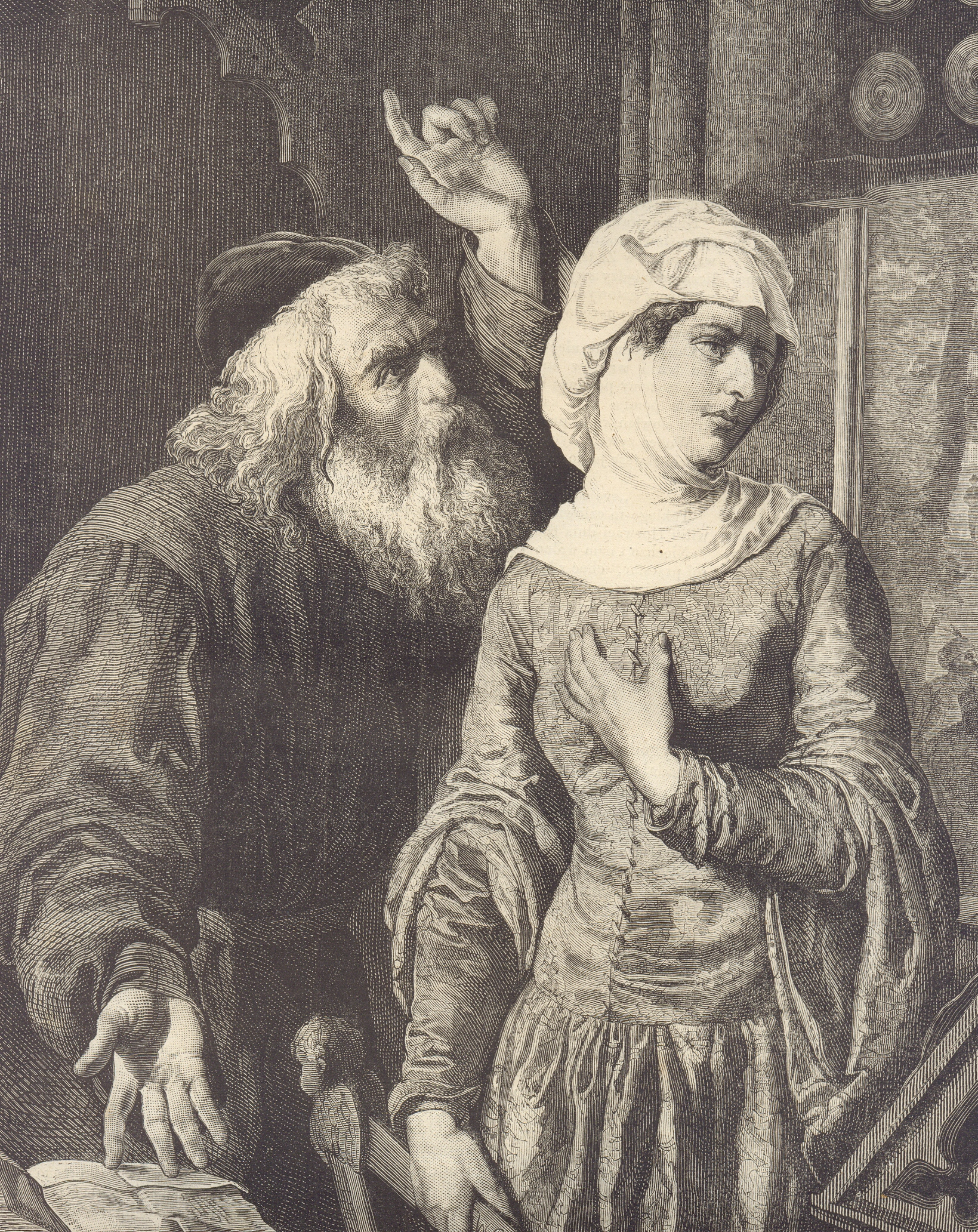 Esterka